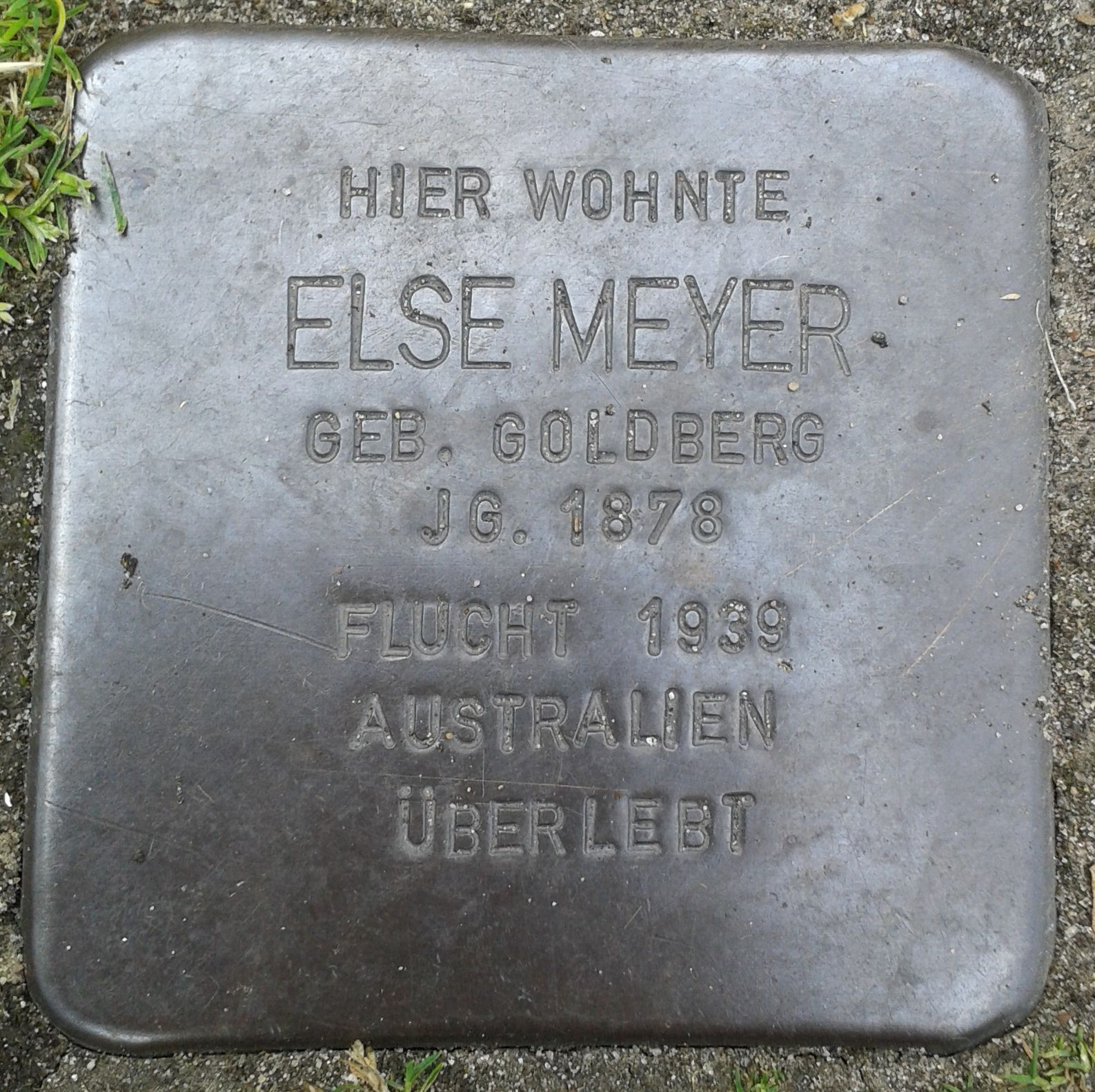 Stolperstein Datteln Carl-Gastreich-Straße 5 Else Meyer